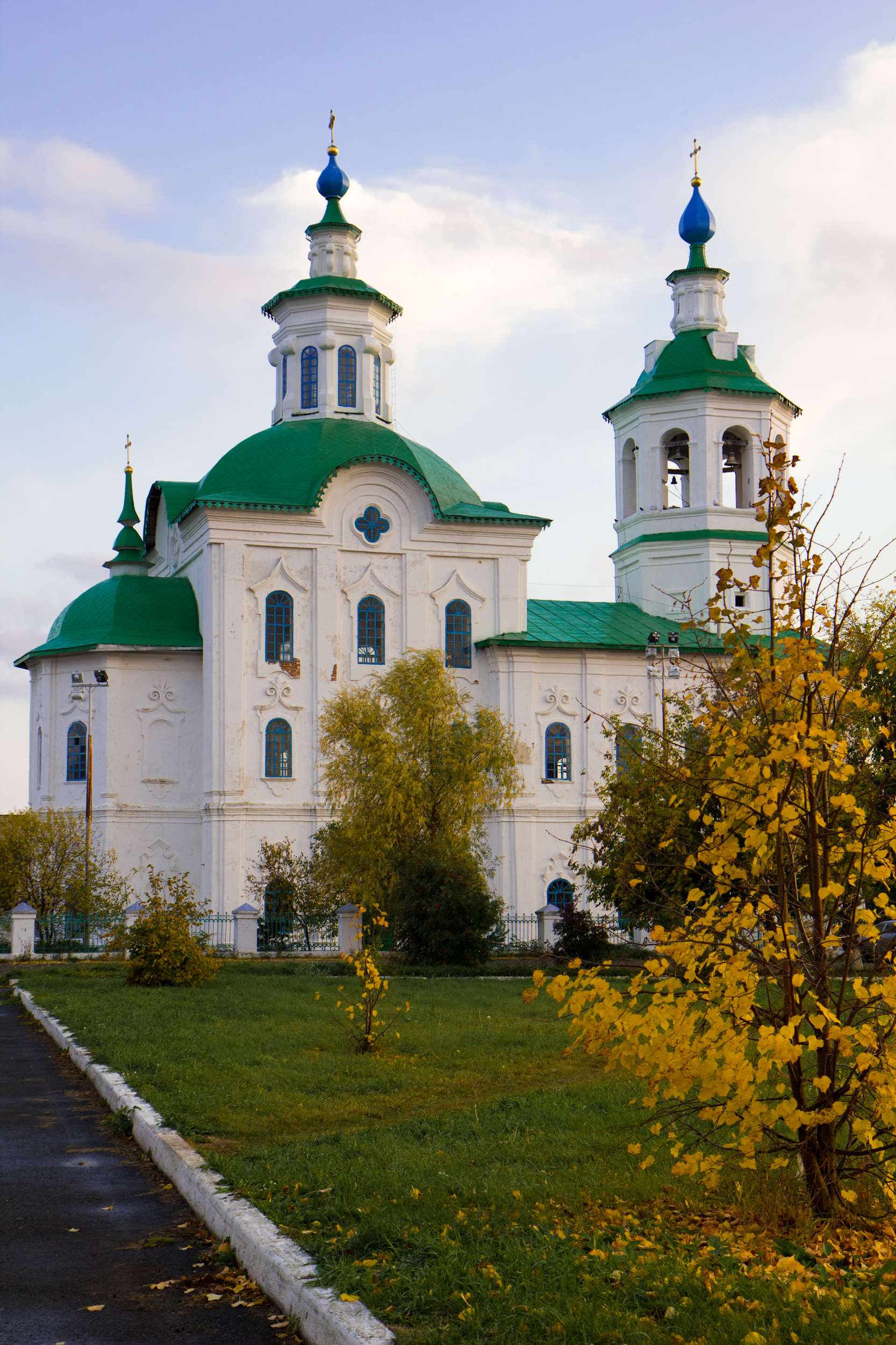 Богоявленский собор, г. Ишим, Тюменская обл. Осень 2012г.